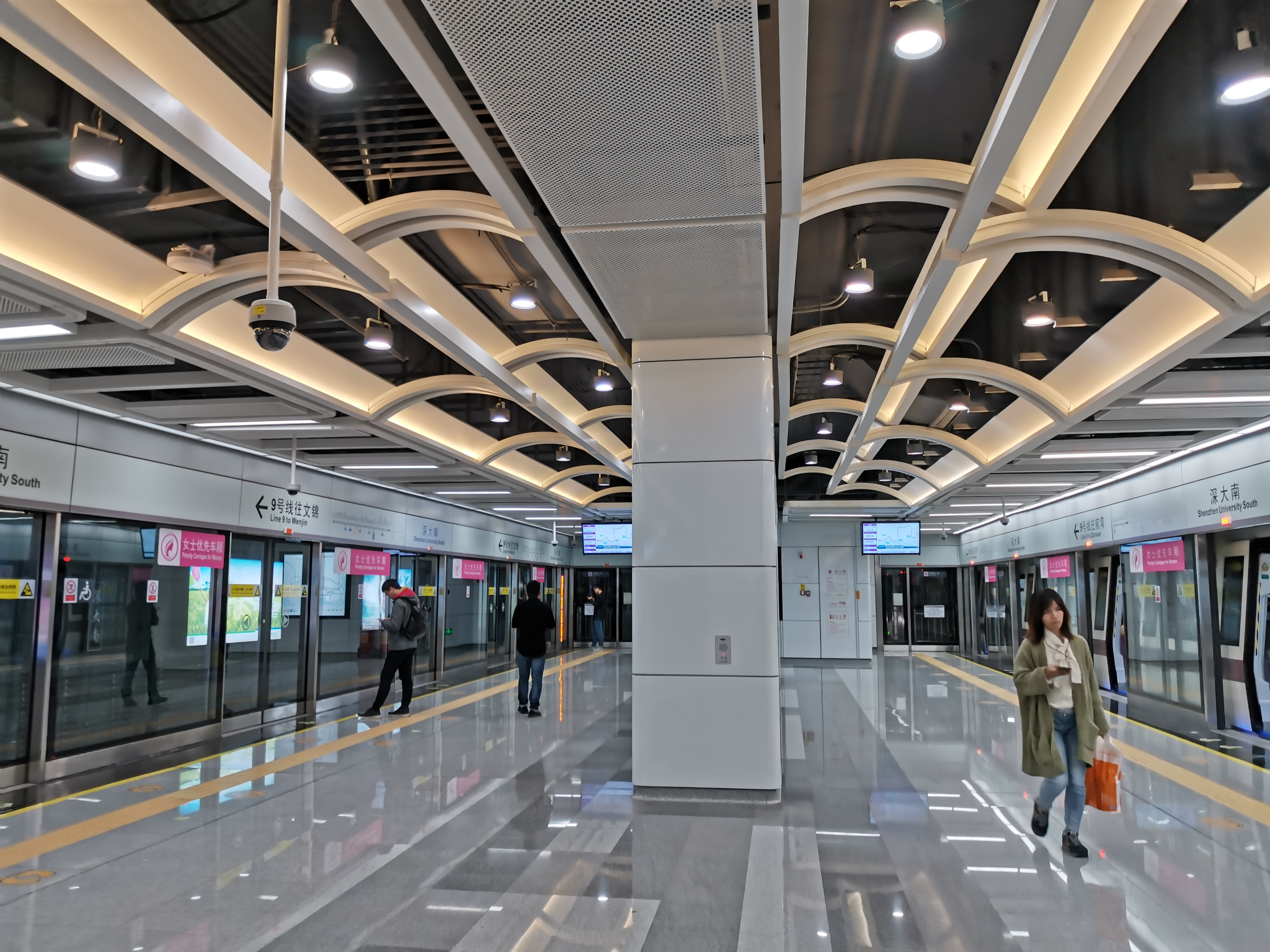 深大南站月台